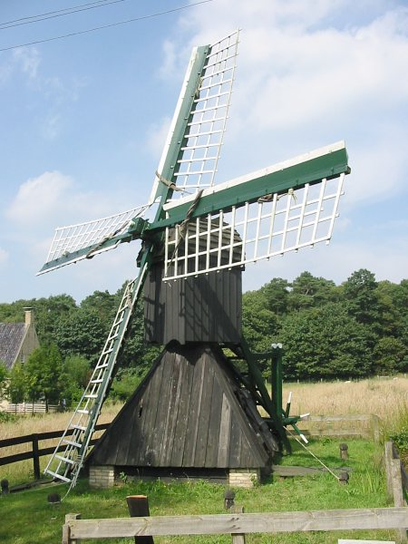 Foto: Hans de Kroon